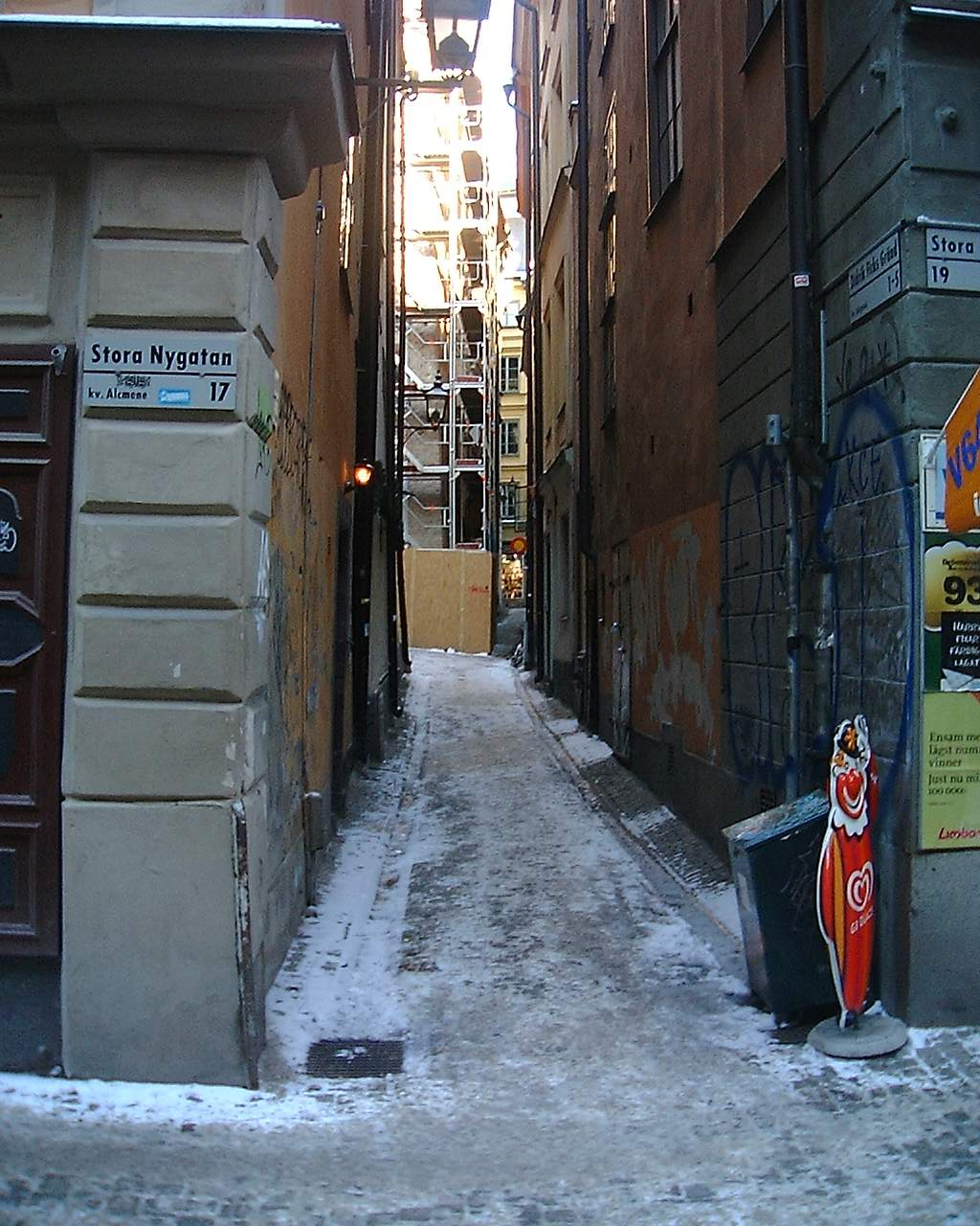 Didrik Ficks Gränd in Gamla stan.